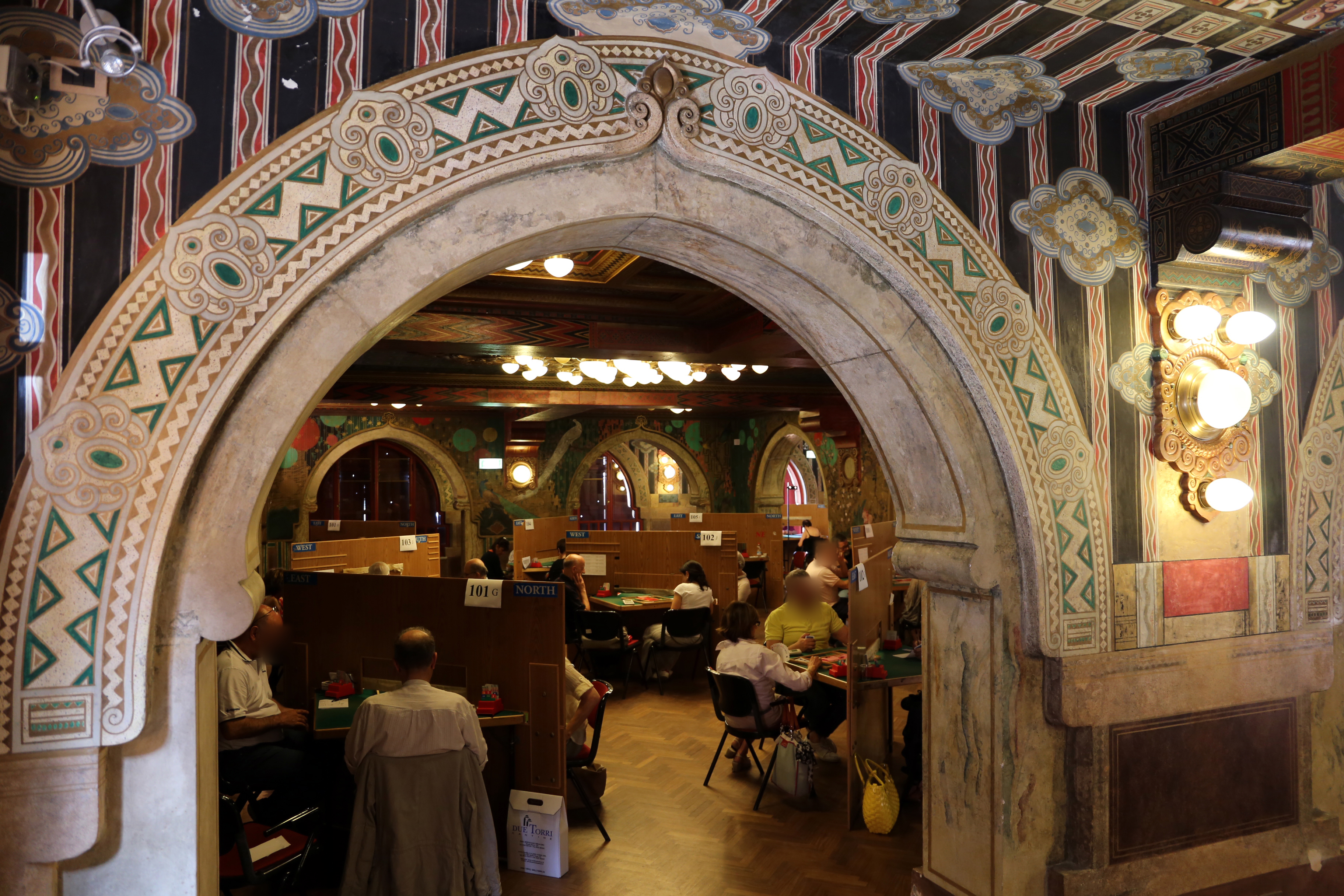 Palazzo dei Congressi (Salsomaggiore Terme) This is a photo of a monument which is part of cultural heritage of Italy.